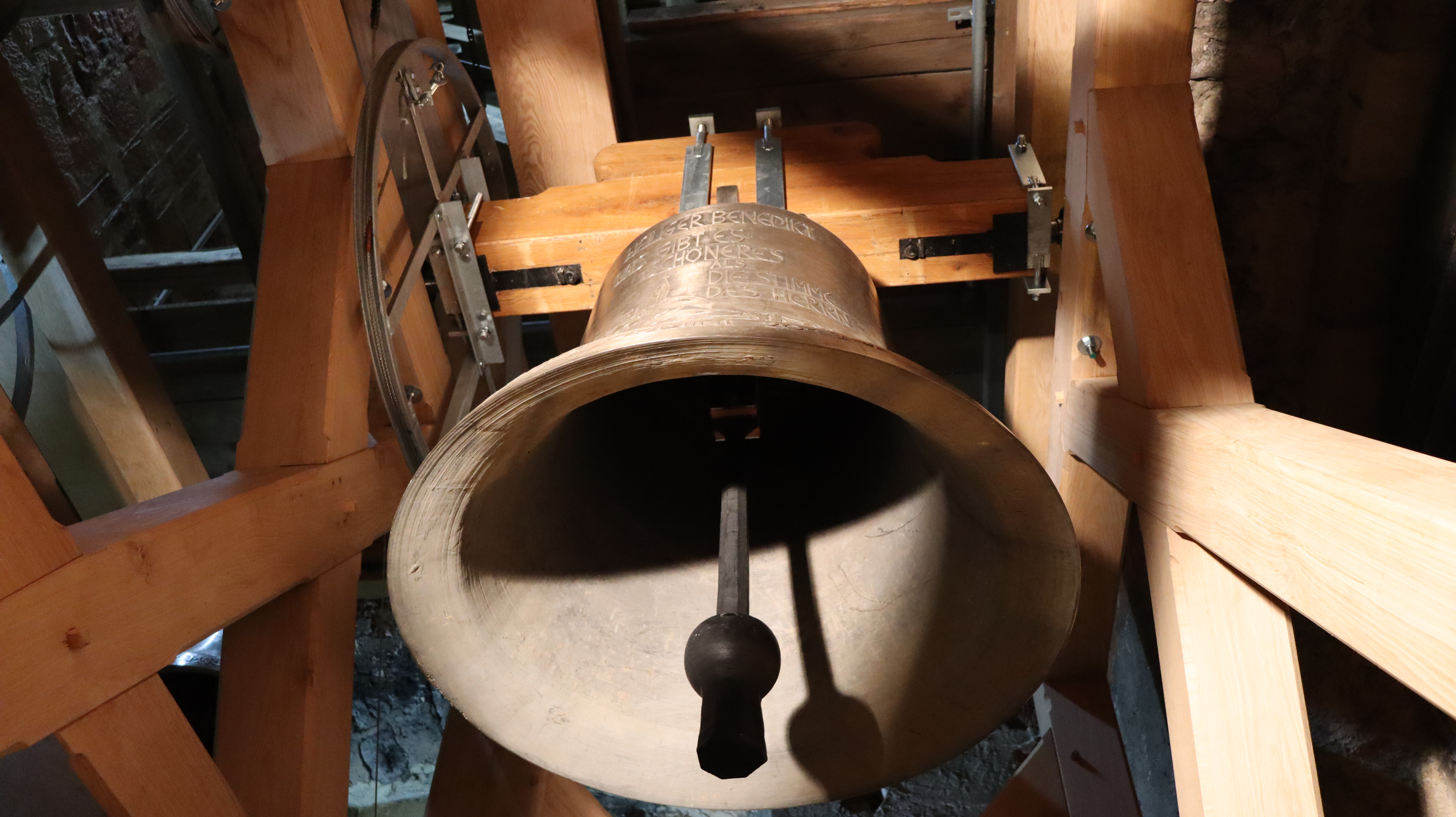 Die neue Glocke Nr. 5 Benedikt und Bernhard mit dem Schlagton g'